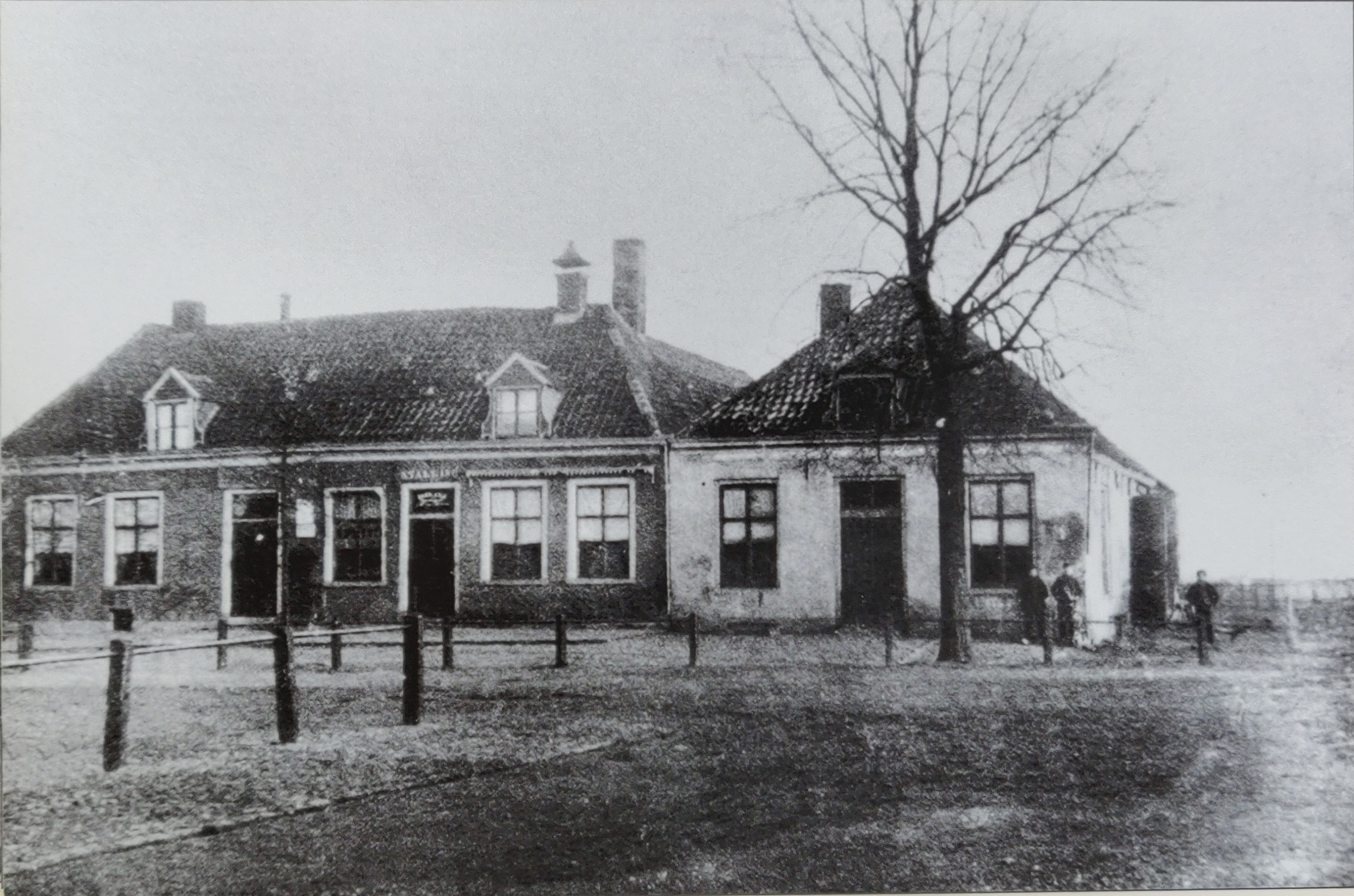 Foto is genomen tussen 1830 en 1889. Op de voorgrond is de oude Beestenmarkt voordat deze werd verplaatst door aankoop van dit terrein door de HIJSM. Eigenaar van de panden was de familie Buitenweerd.